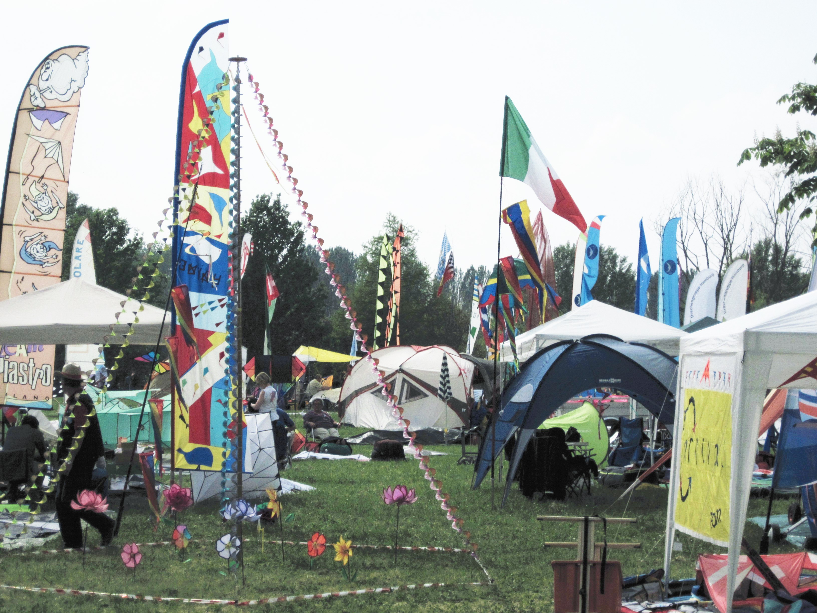 Il parco urbano Giorgio Bassani è un'ampia area compresa tra le mura di Ferrara ed il fiume Po.